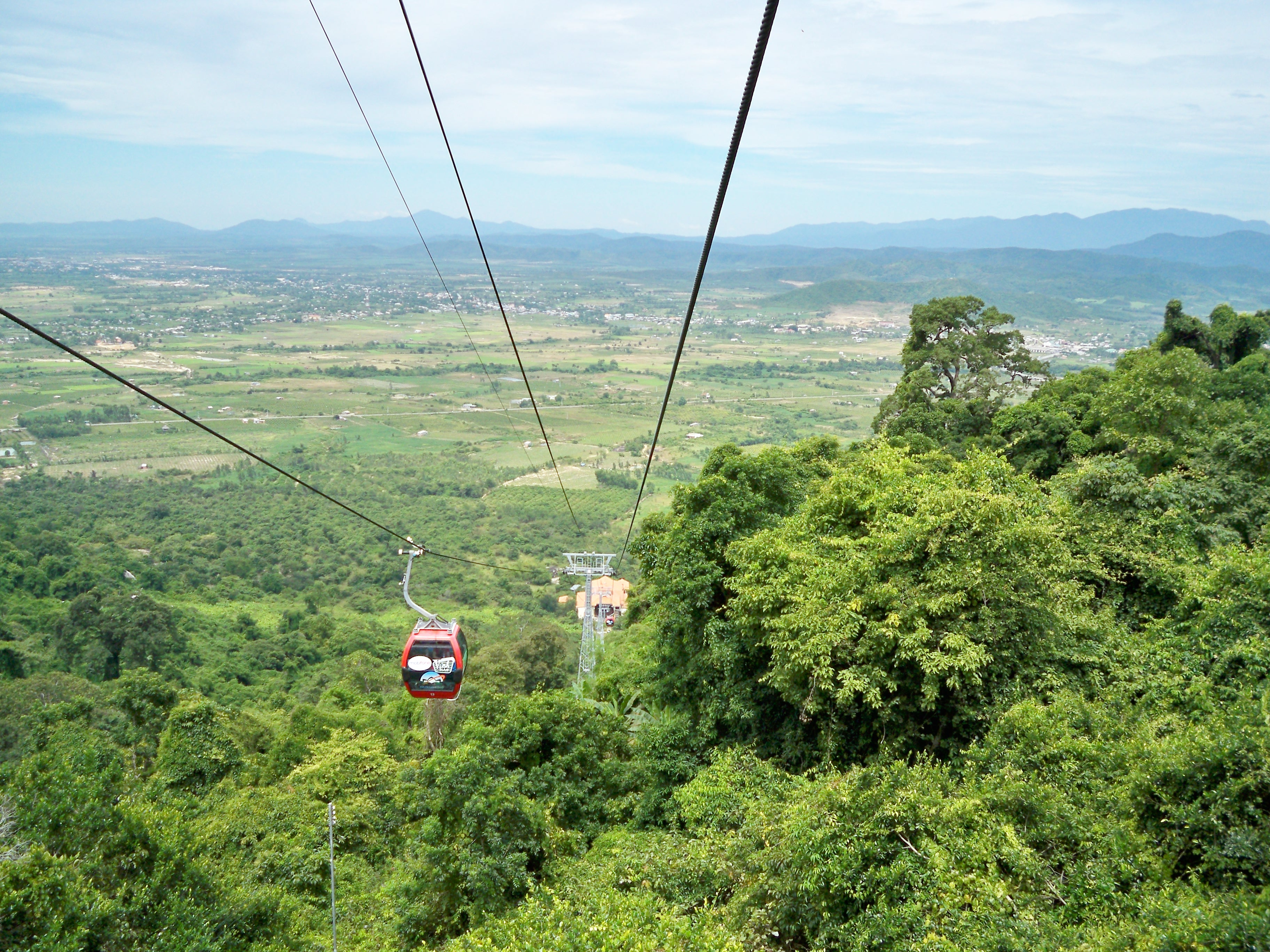 cáp treo Tà Cú - do Phan Minh Châu chụp tại núi Tà Cú